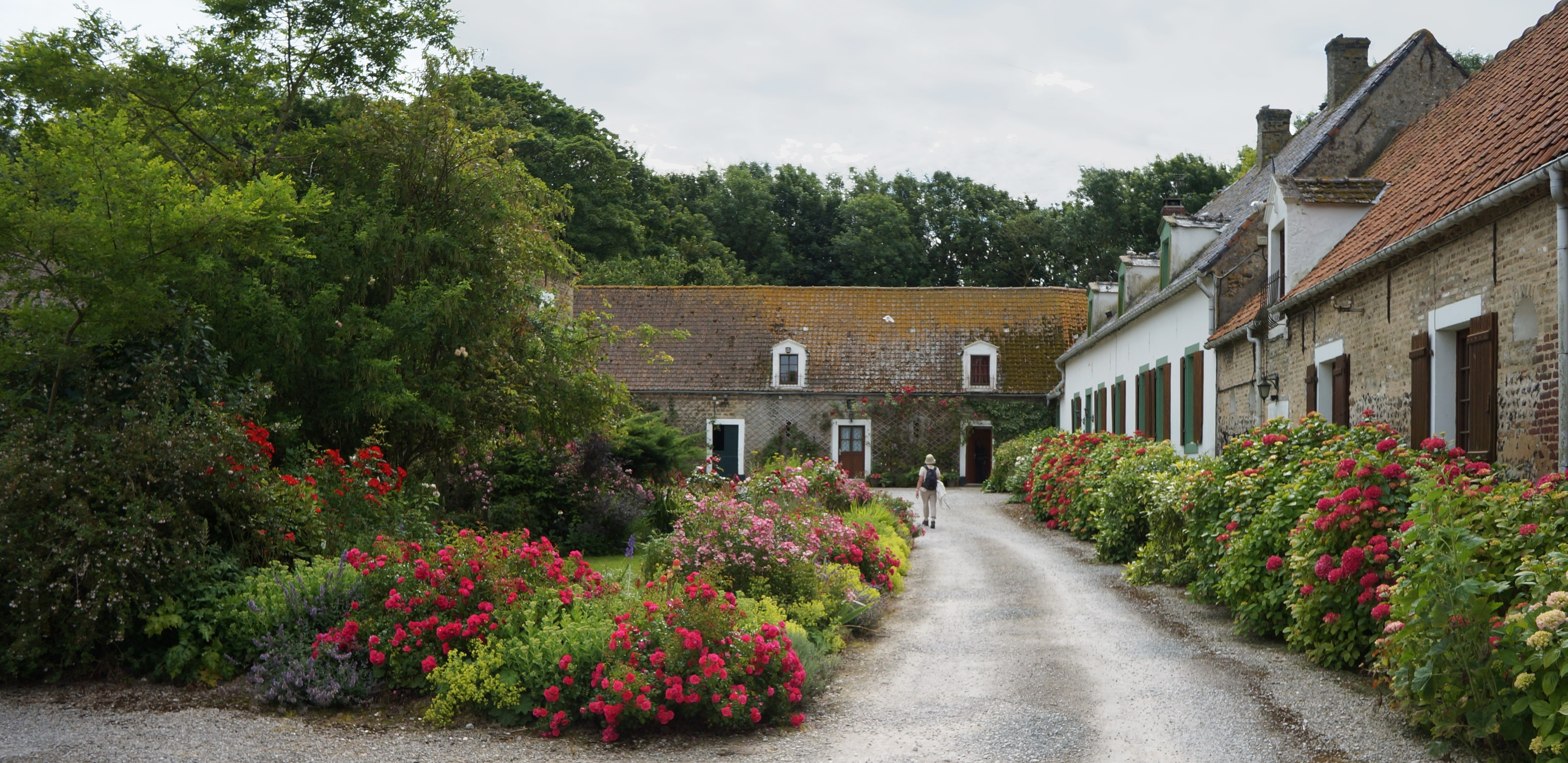 La Grand'Maison, Hameau de la Haute-Escalles.